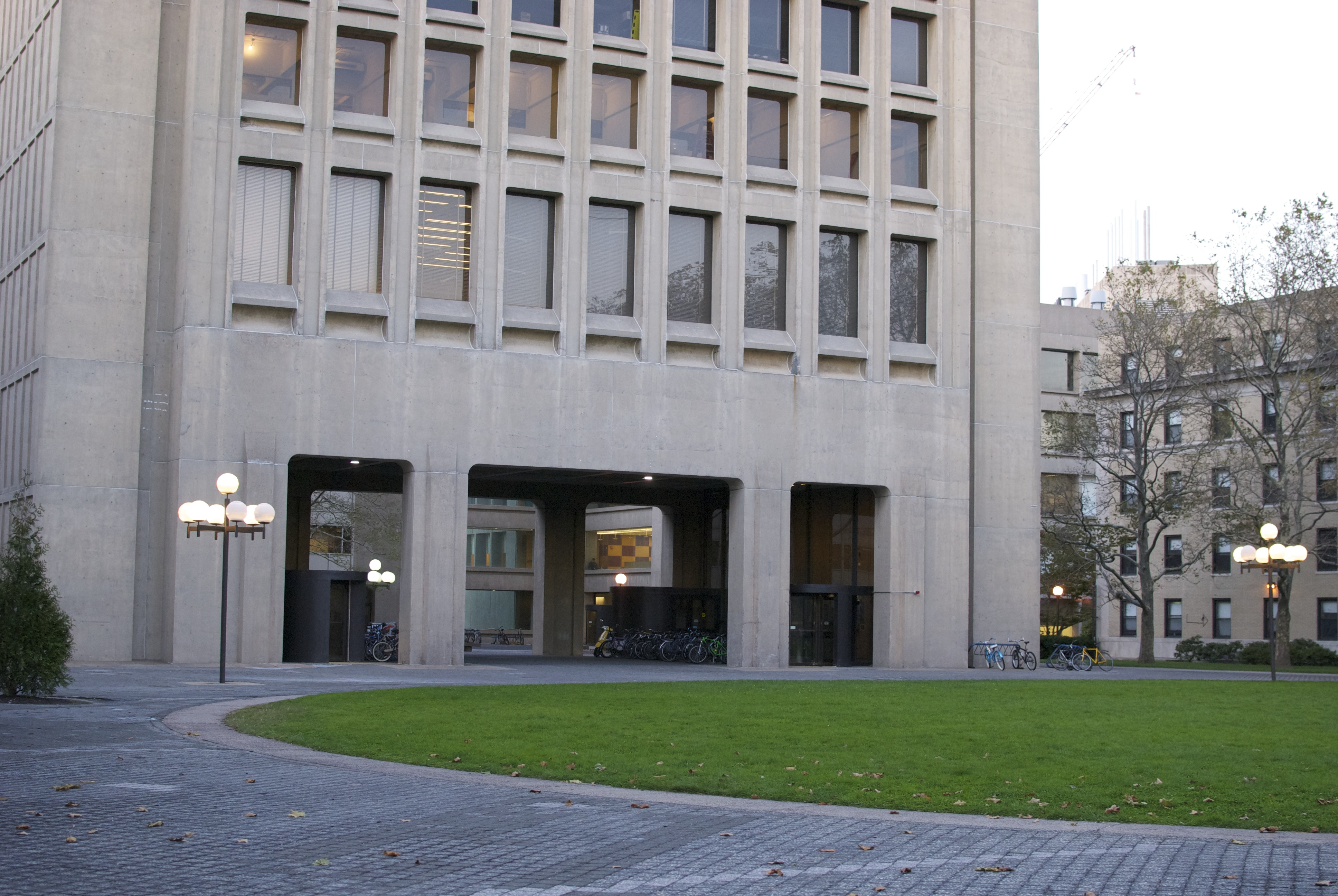 MIT Campus